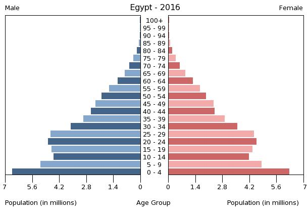 A population pyramid illustrates the age and sex structure of a country's population and may provide insights about political and social stability, as well as economic development. The population is distributed along the horizontal axis, with males shown on the left and females on the right. The male and female populations are broken down into 5-year age groups represented as horizontal bars along the vertical axis, with the youngest age groups at the bottom and the oldest at the top. The shape of the population pyramid gradually evolves over time based on fertility, mortality, and international migration trends.